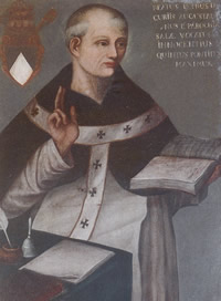 Pope Innocentius V